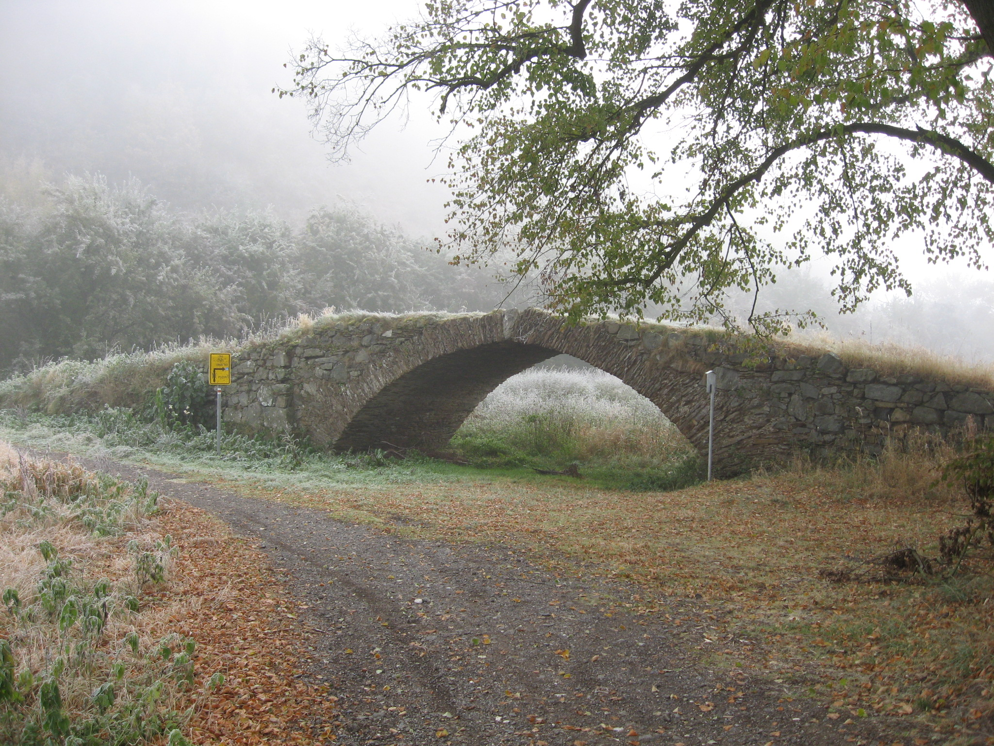 Žižkův most (Dolní Poříčí), okr.Strakonice